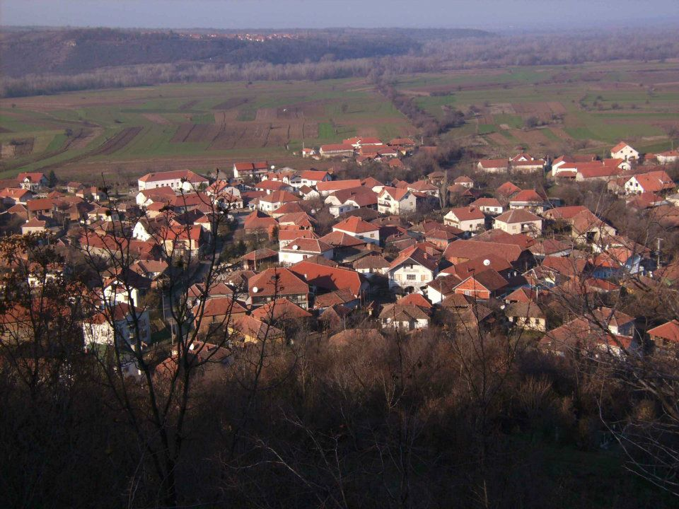 Kovilovo (Negotin)